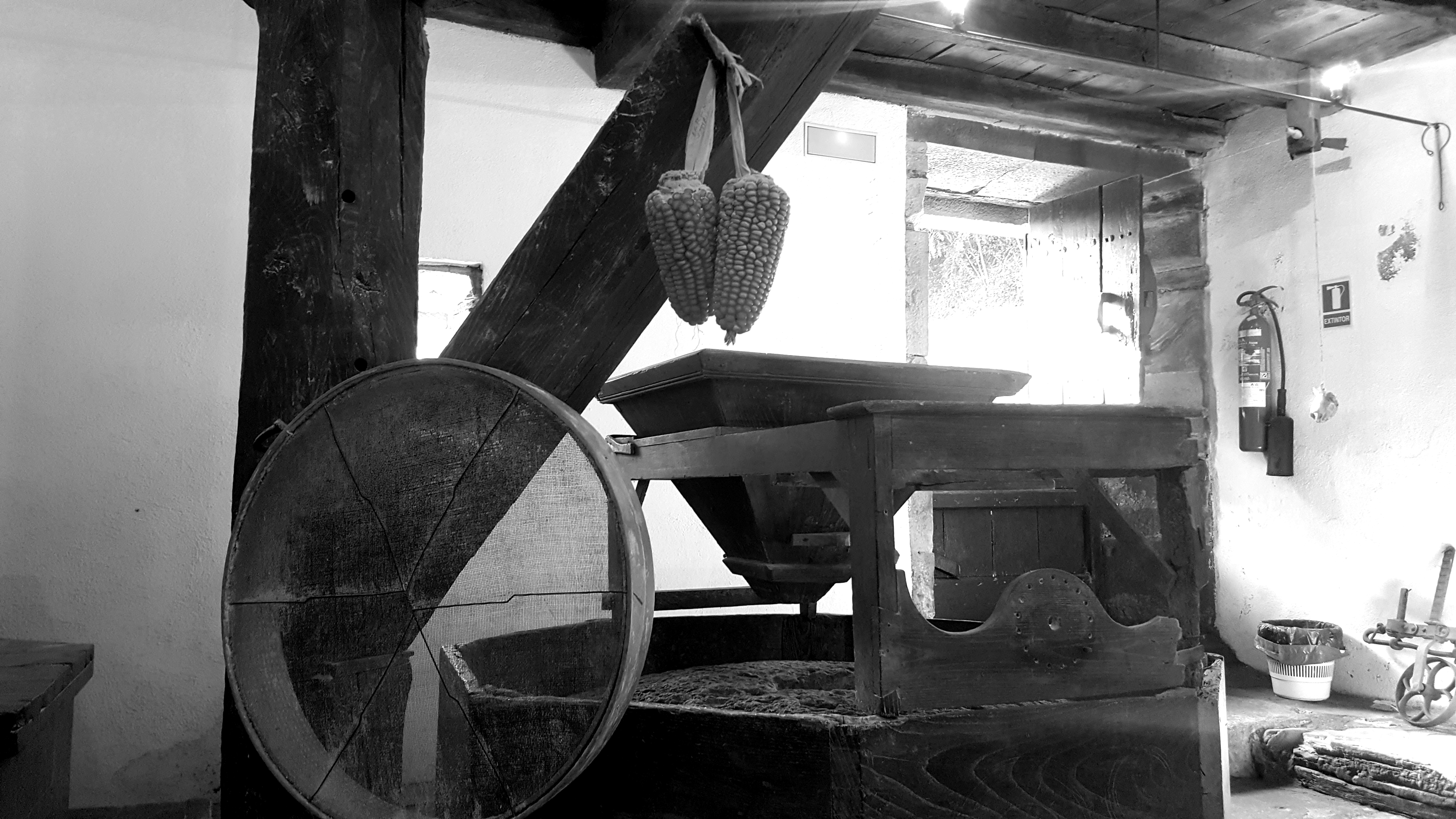 Nafarroako Zubietako errota